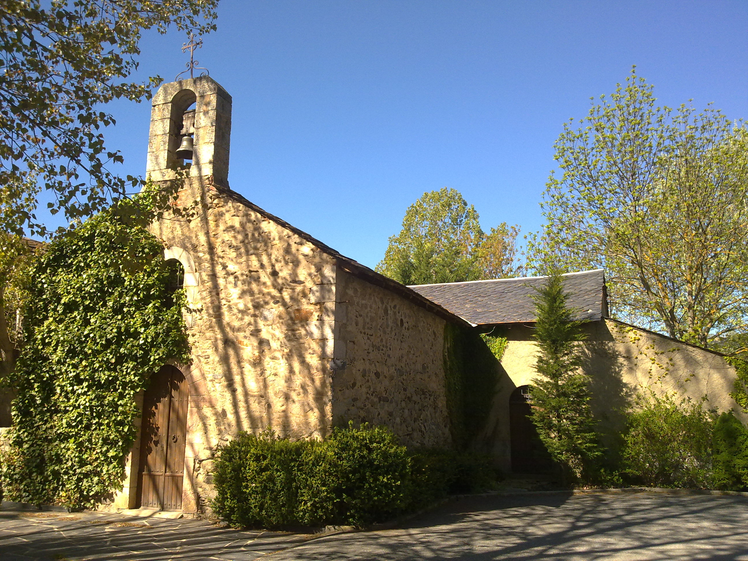 Ermita de Sant Martí d'Aravó dins del municipi de Guils de Cerdanya.